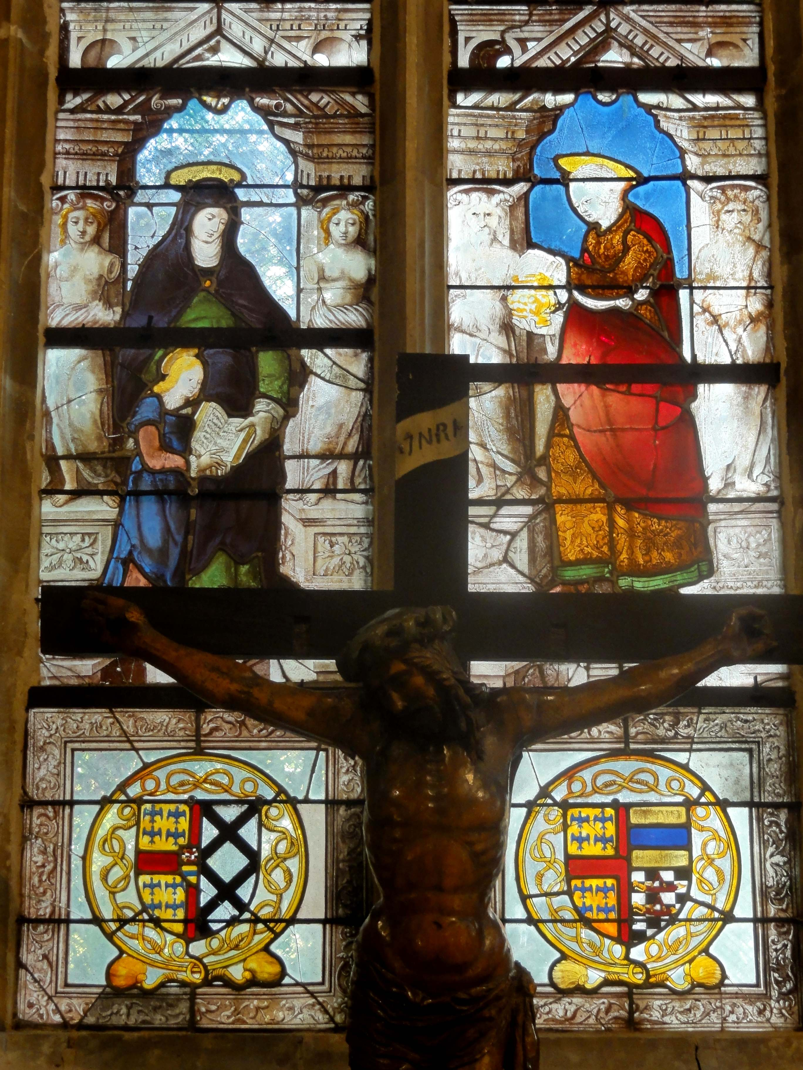 Verrière n° 0 - Éducation de la Vierge et Marie-Madeleine.